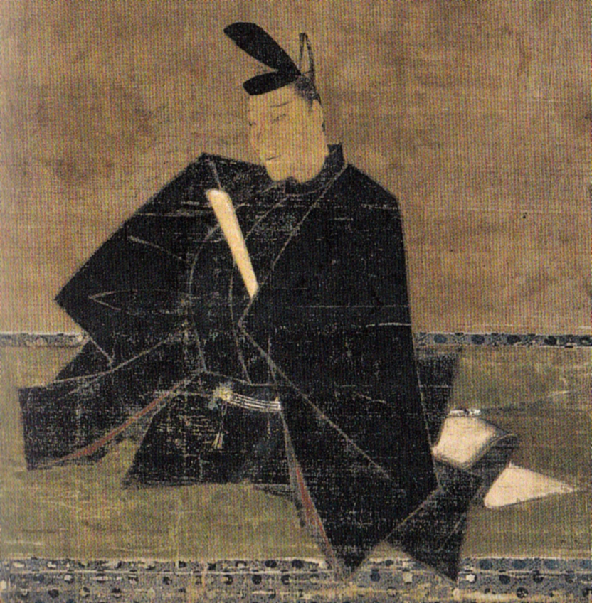 藤原定家の肖像画